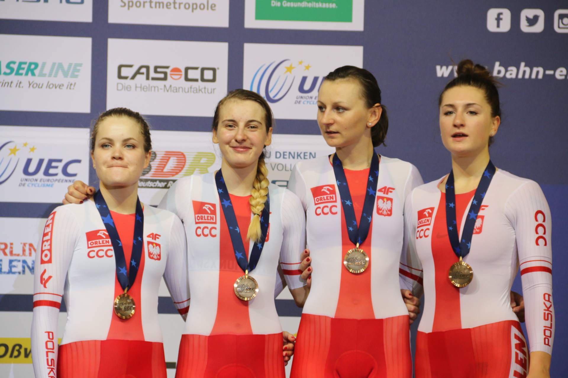 Bahn-Vierer der Frauen, Polen, Bronze in der Mannschaftsverfolgung, v.l.n.r.: Daria Pikulik, Nikol Plosaj, Katarzyna Pawłowska,Justyna Kaczkowska